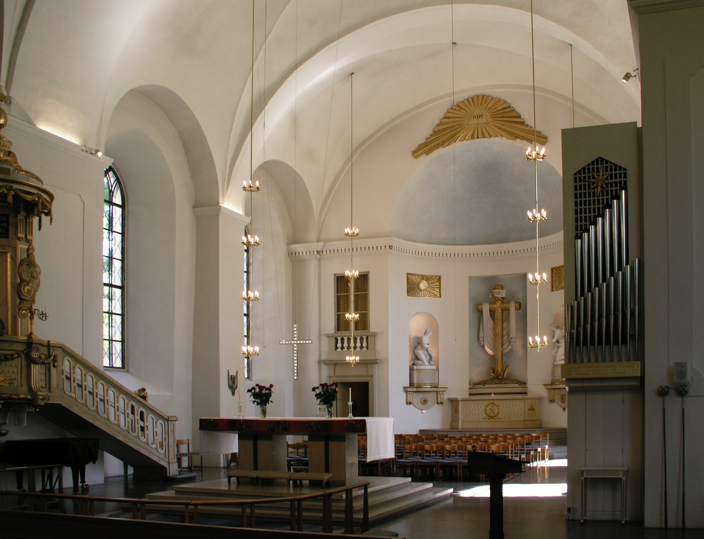 Karlstads domkyrka / Cathedral of Karlstad. Nave.